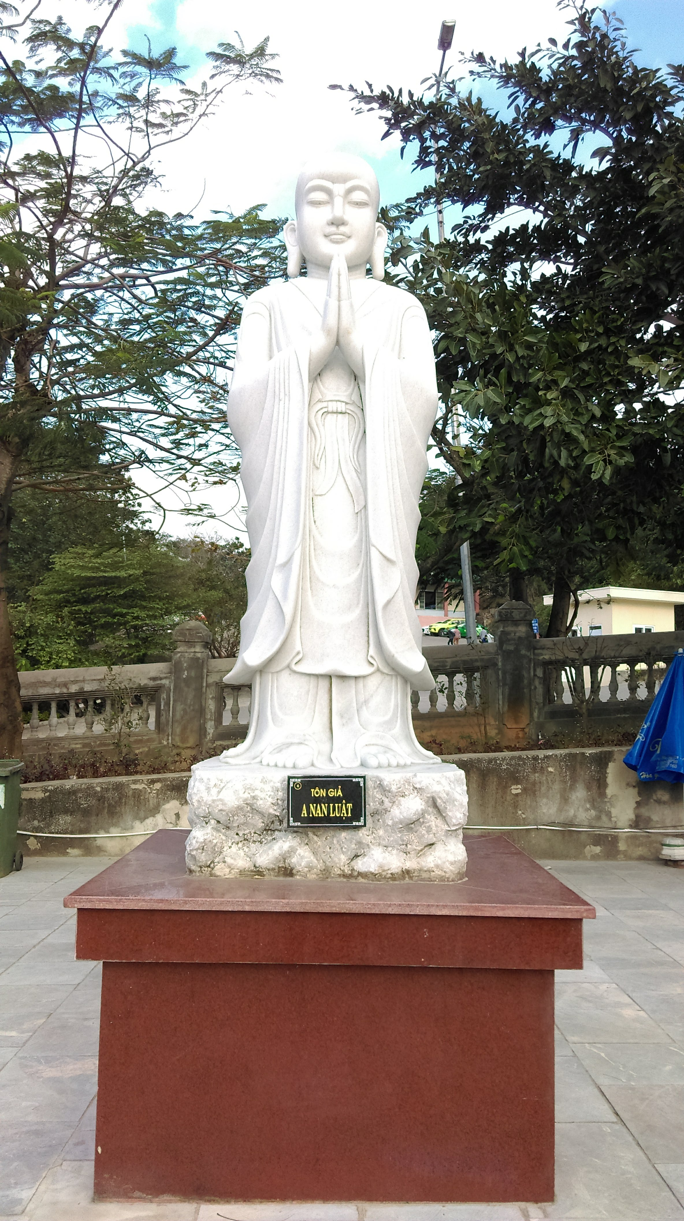 A Nan Luật, chùa Linh Ứng Sơn Trà, Đà Nẵng